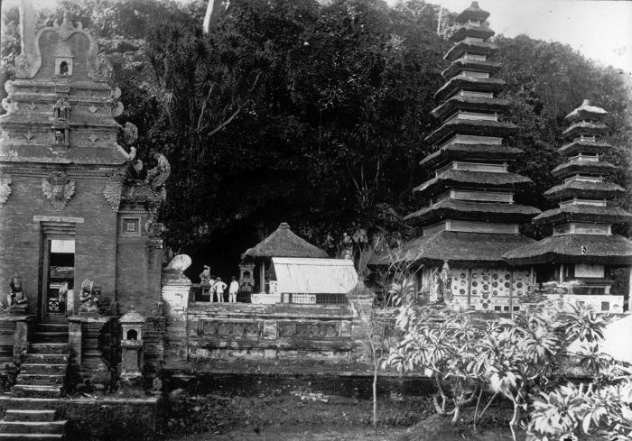 Foto. Bali, de vleermuizengroet bij Gowa Lawah.